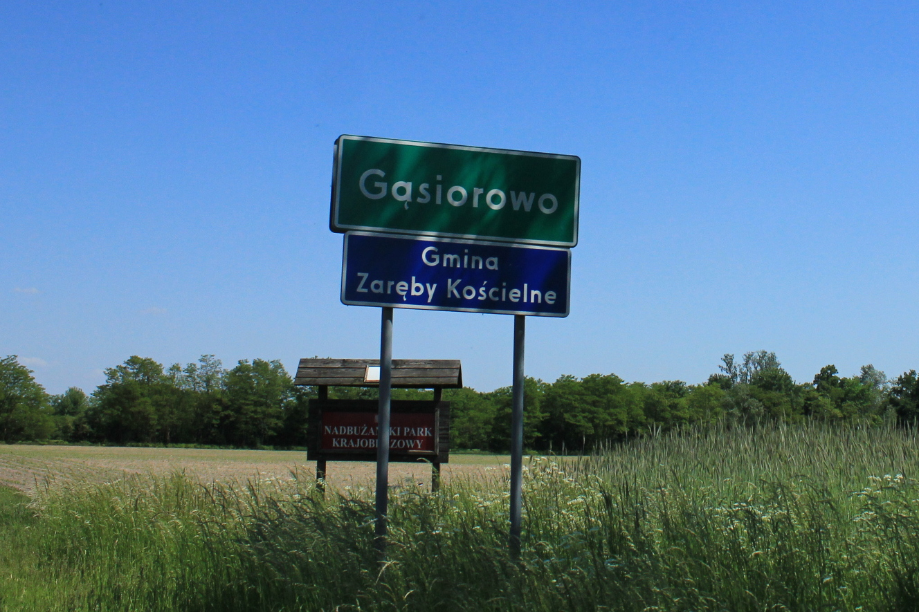 Gąsiorowo - wieś w Polsce położona w województwie mazowieckim, w powiecie ostrowskim, w gminie Zaręby Kościelne